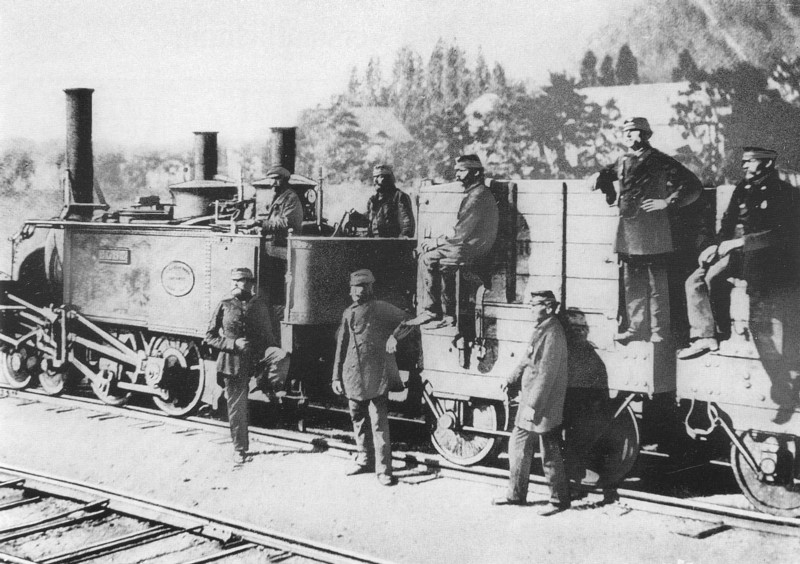 Zug der Hänicher Kohlezweigbahn